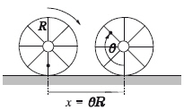 Rodadura